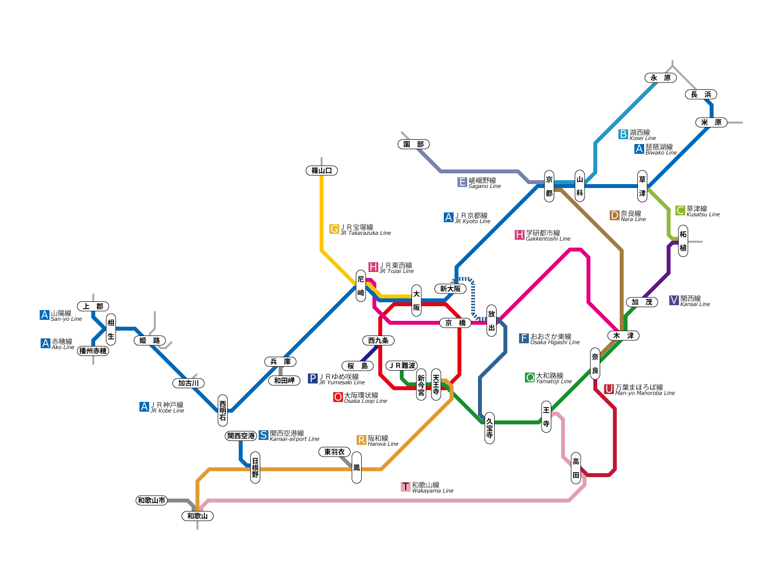 JR西日本アーバンネットワークエリア